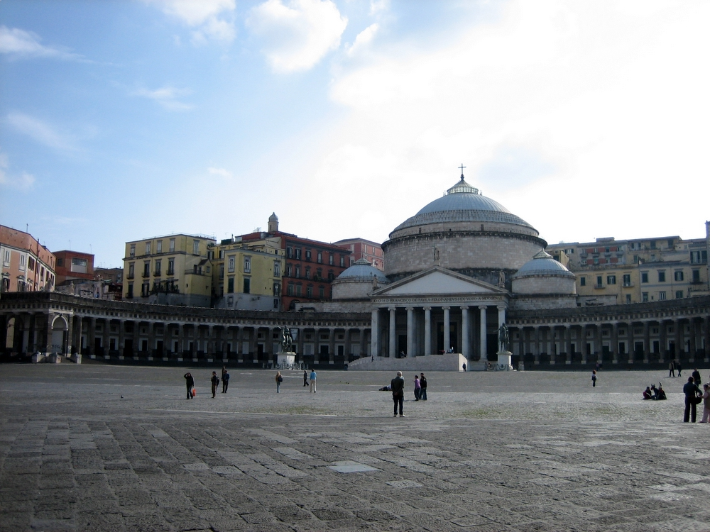 Porto, Napoli, ItaliaIMG_0440